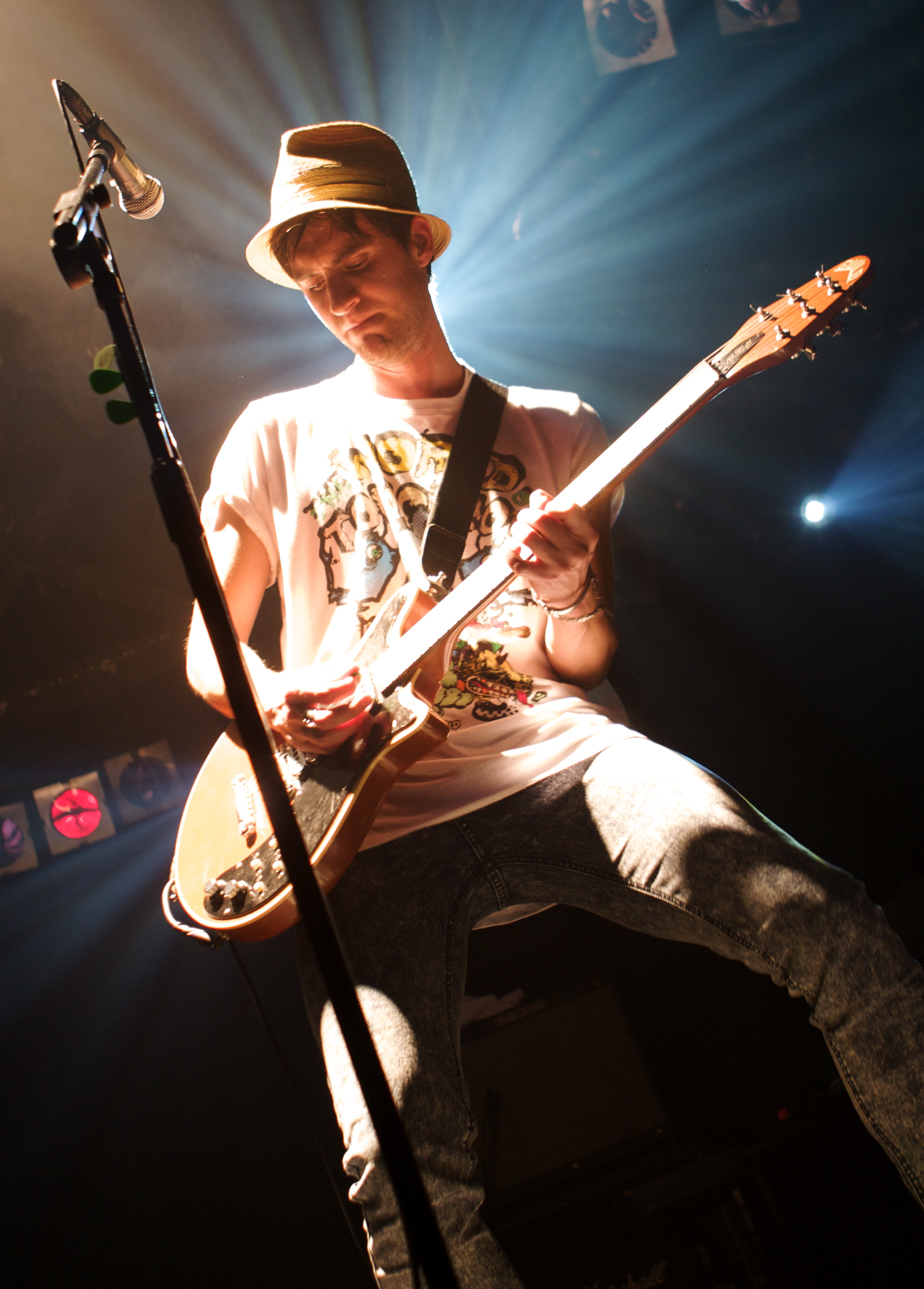 The Sounds en la sala Razzmatazz 2 de Barcelona el 12 de Marzo de 2009, podéis leer una crónica del concierto en